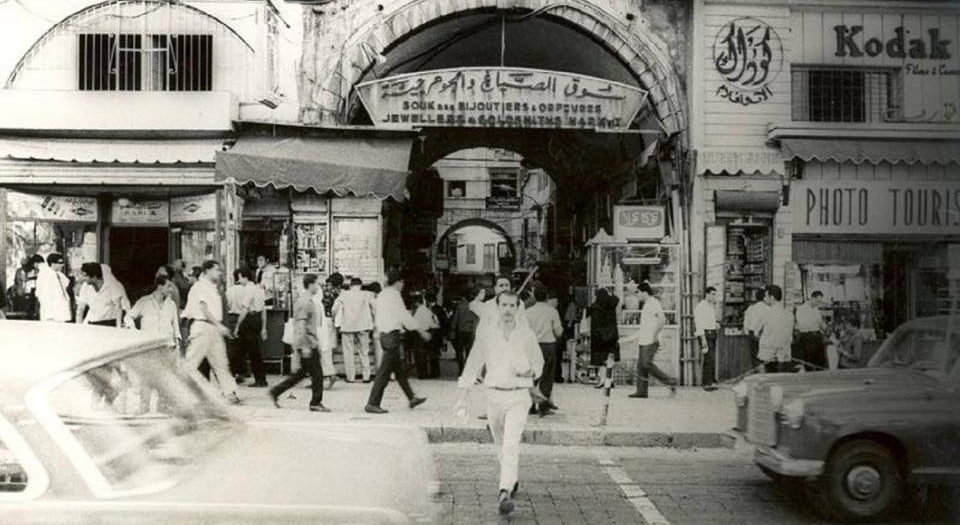 صورة تاريخية لاحد الأسواق الشعبية في بيروت ،حيث كانت من أشهر وأهم الأسواق